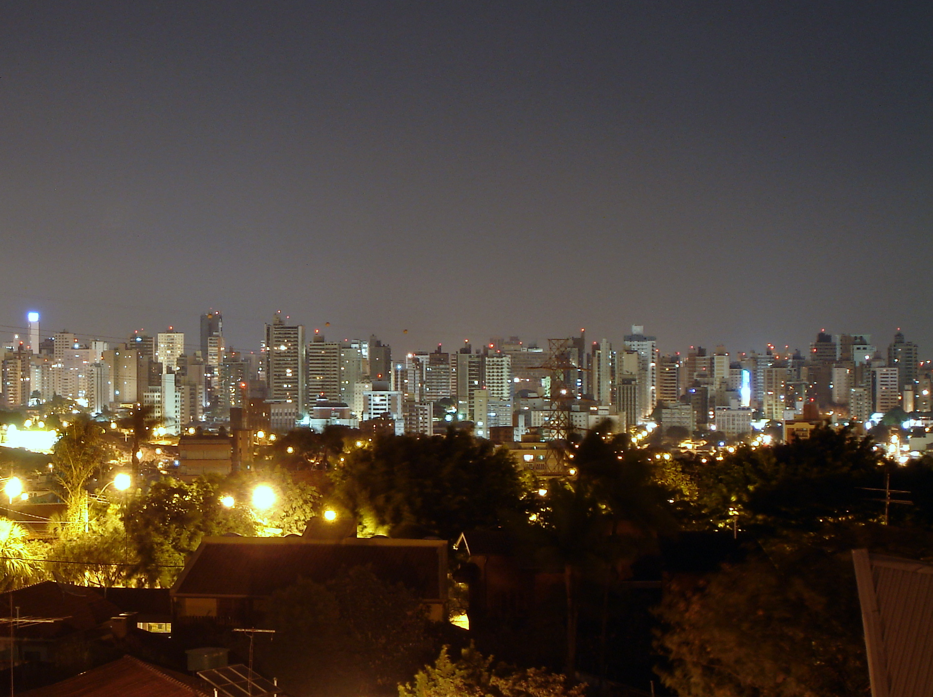 Campinas à noite.